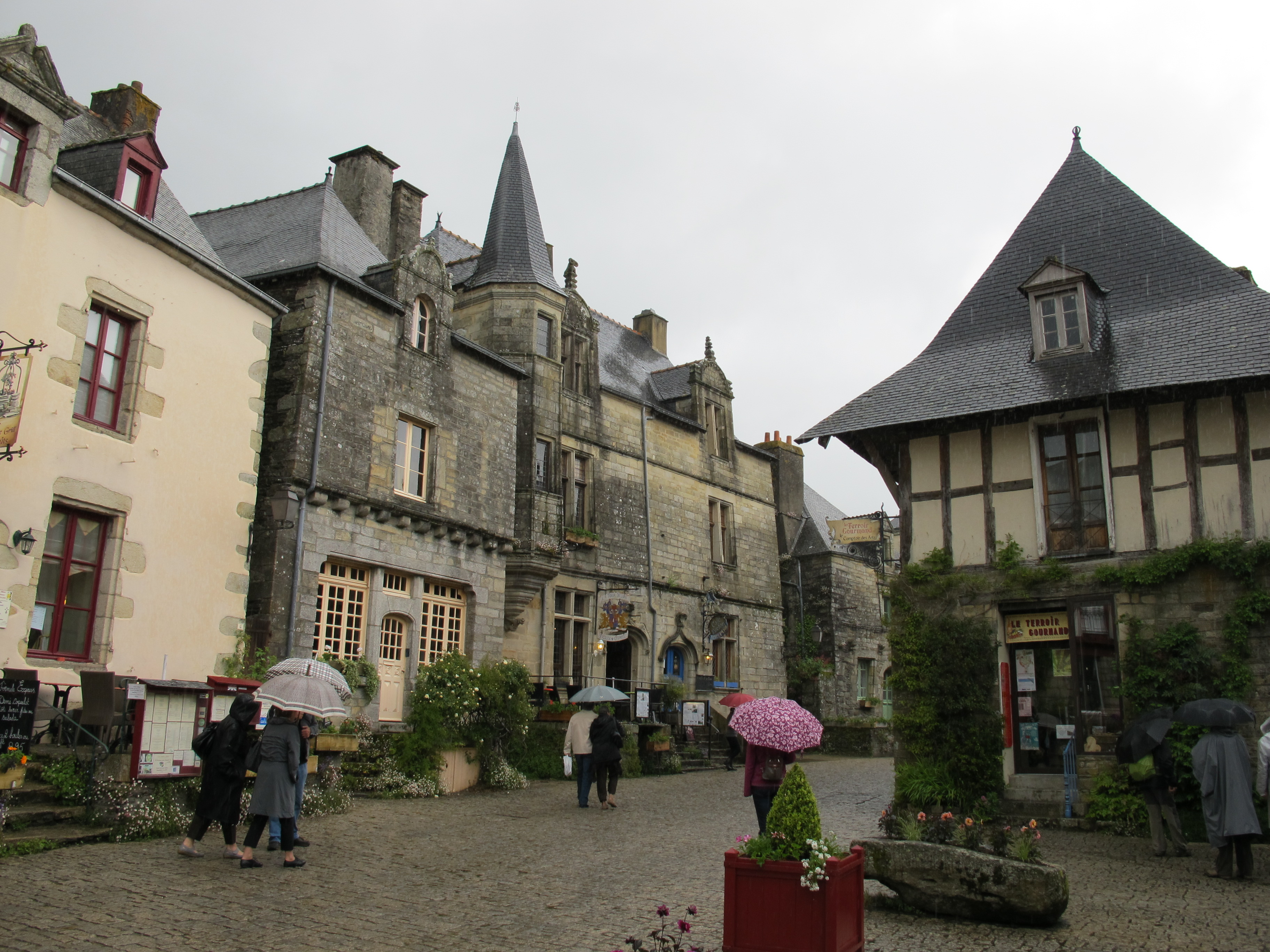 Immeuble, Rochefort-en-Terre, PA00091645 + Maison avec tourelle, Rochefort-en-Terre (PA00091640)